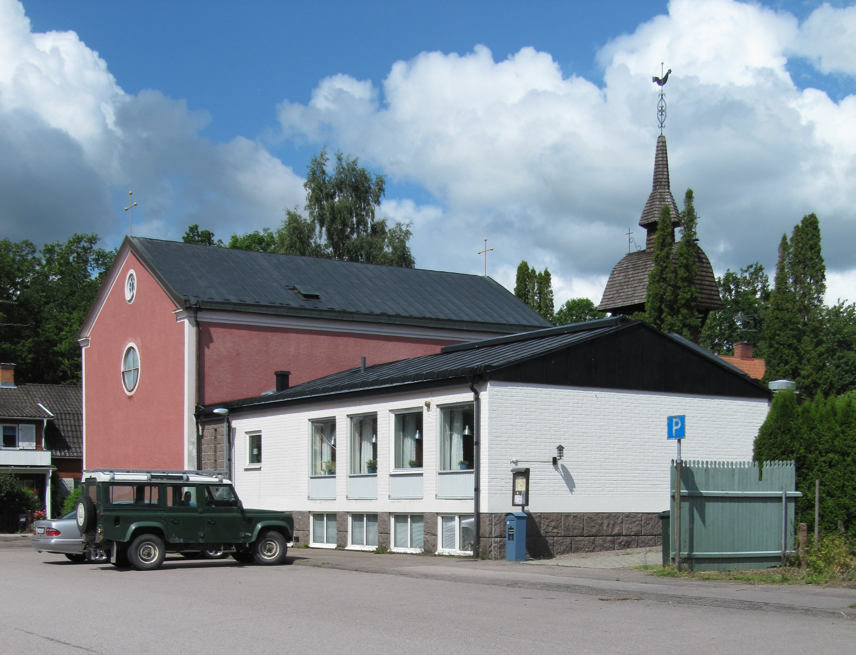 Figeholms kyrka från sydost